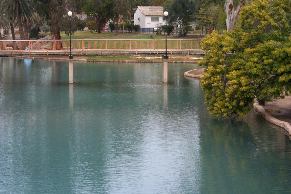 Asi river at kibbutz Nir David